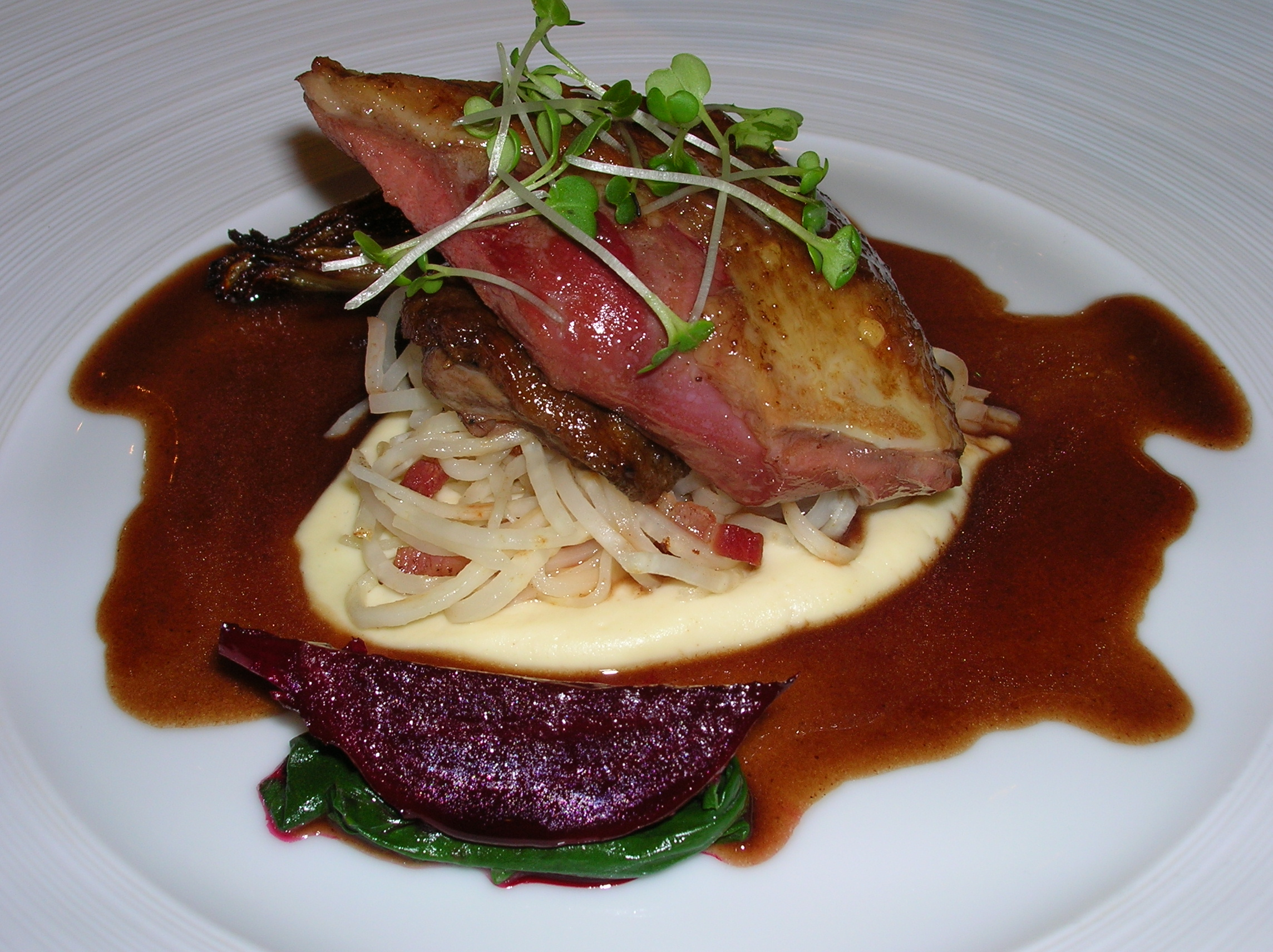 מסעדת לה מנואר או קואט סזון